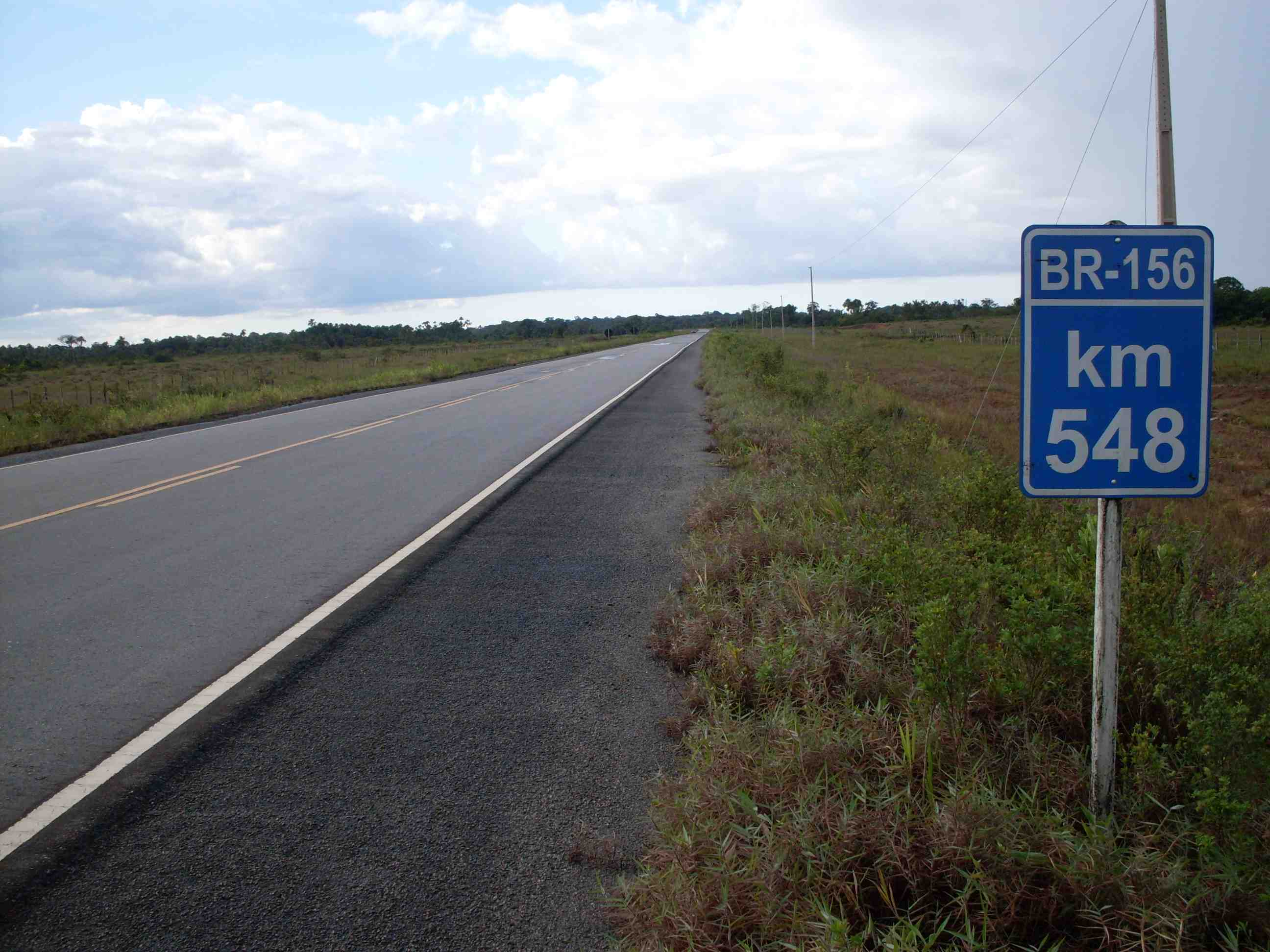 BR-156